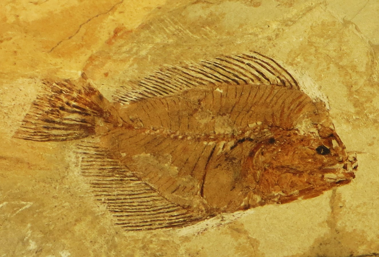 Fossil of Amphistium, an extinct fish- Took the picture at Museo di Arsago Seprio